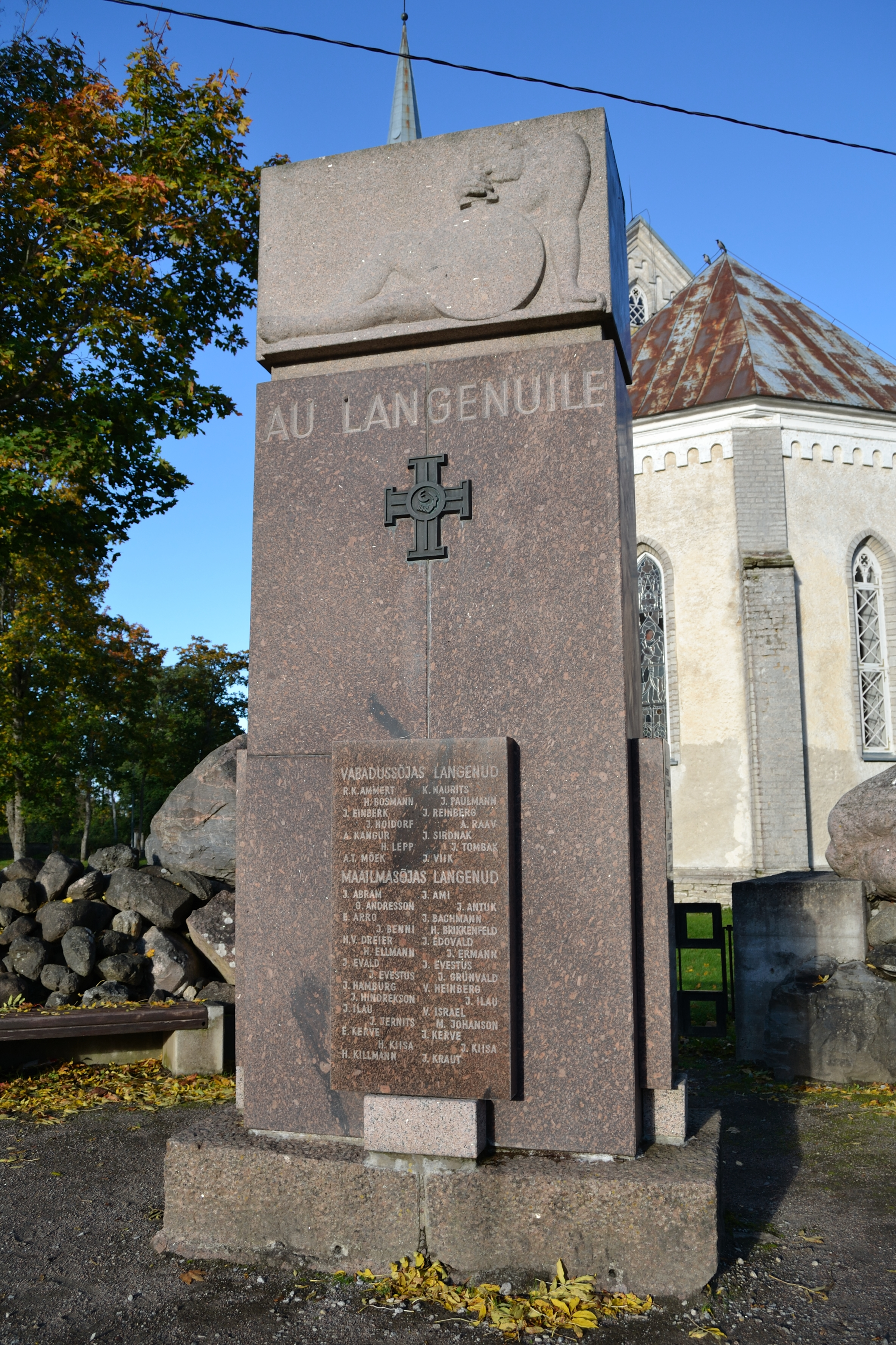 Vabadussõja mälestussammas Riisiperes